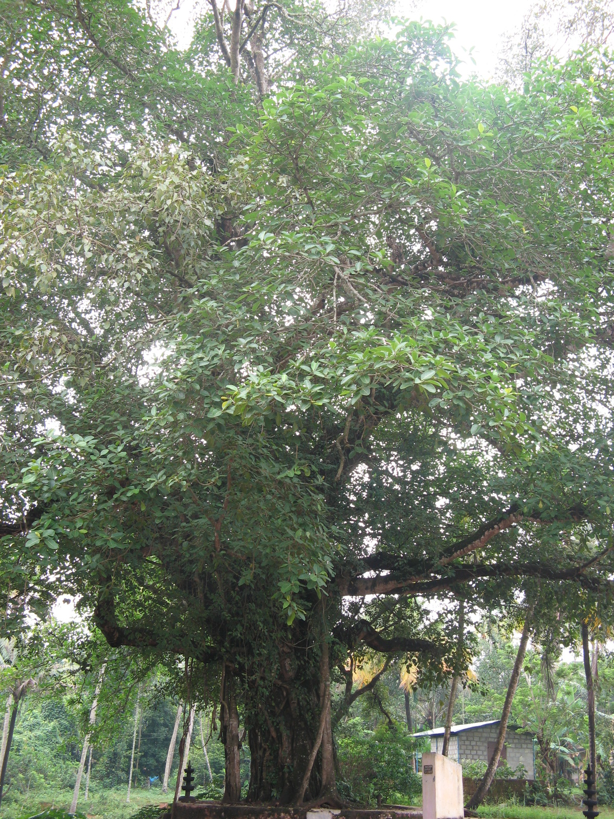 തലയാക്കുളം ക്ഷേത്രം- കിഴക്കേവശത്തെ ആൽമരം